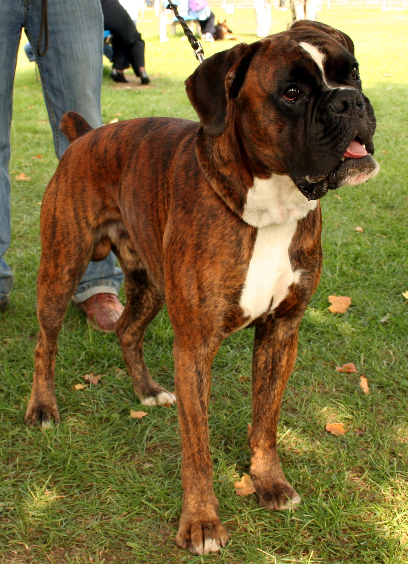 Bokser_pręgowany na krajowej wystawie w Rybniku - Kamieniu